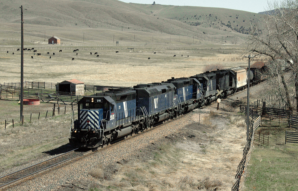 4 23 05 186xRP LM Arr Garrison